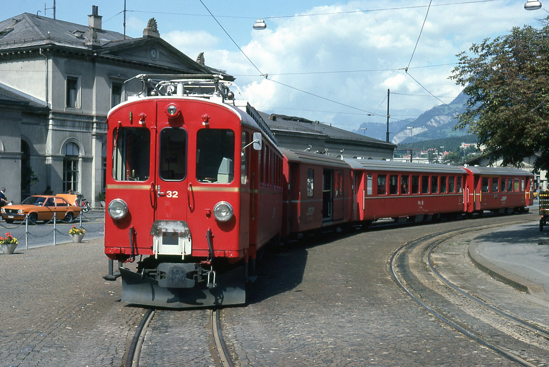 Photo prise dans les années 1980.